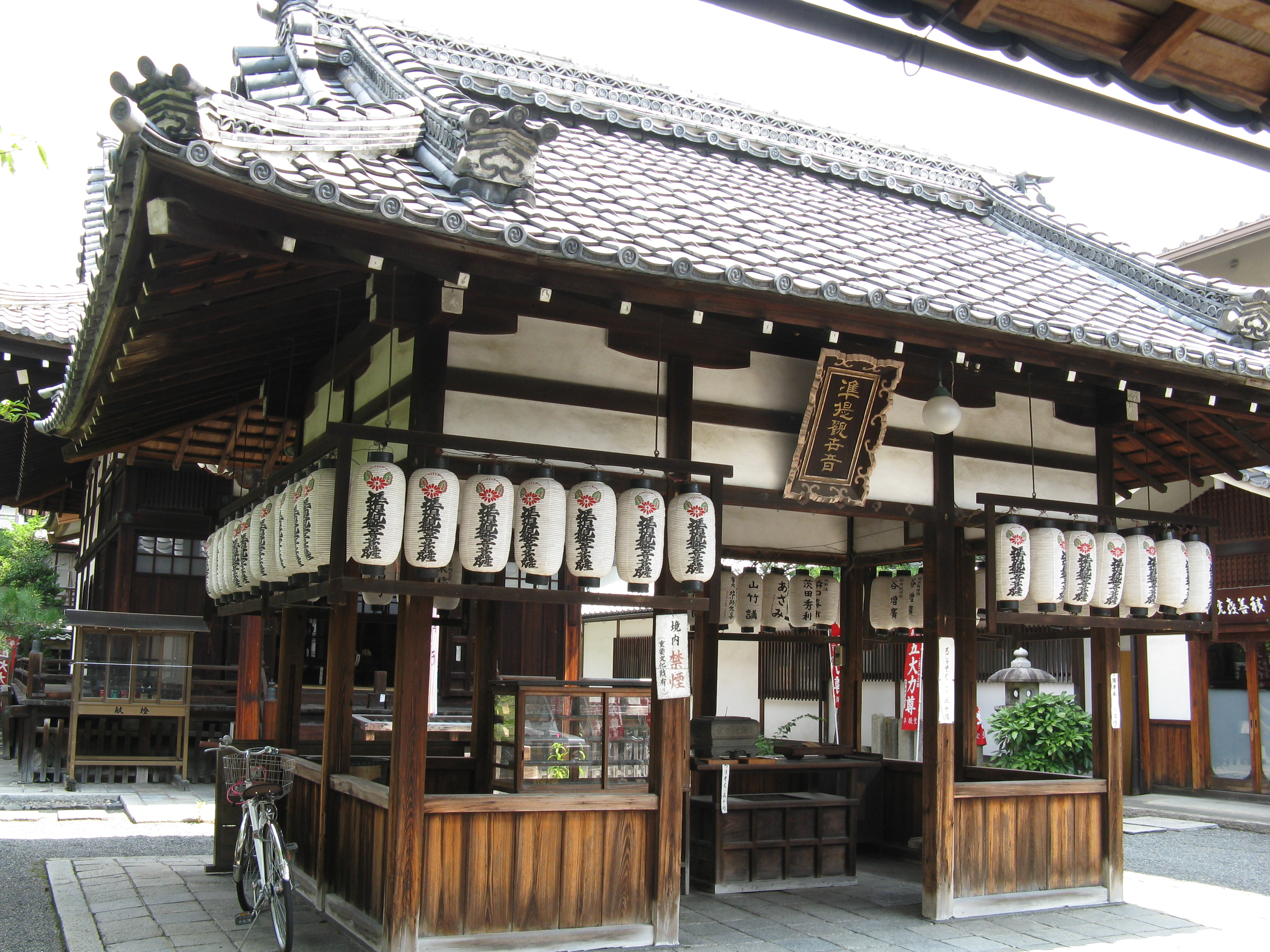 積善院 拝殿